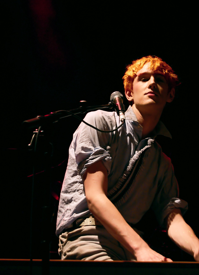 Patrick Wolf au festival Pop Montreal. Cabaret juste pour rire, 5 oct. 2007Patrick Wolf